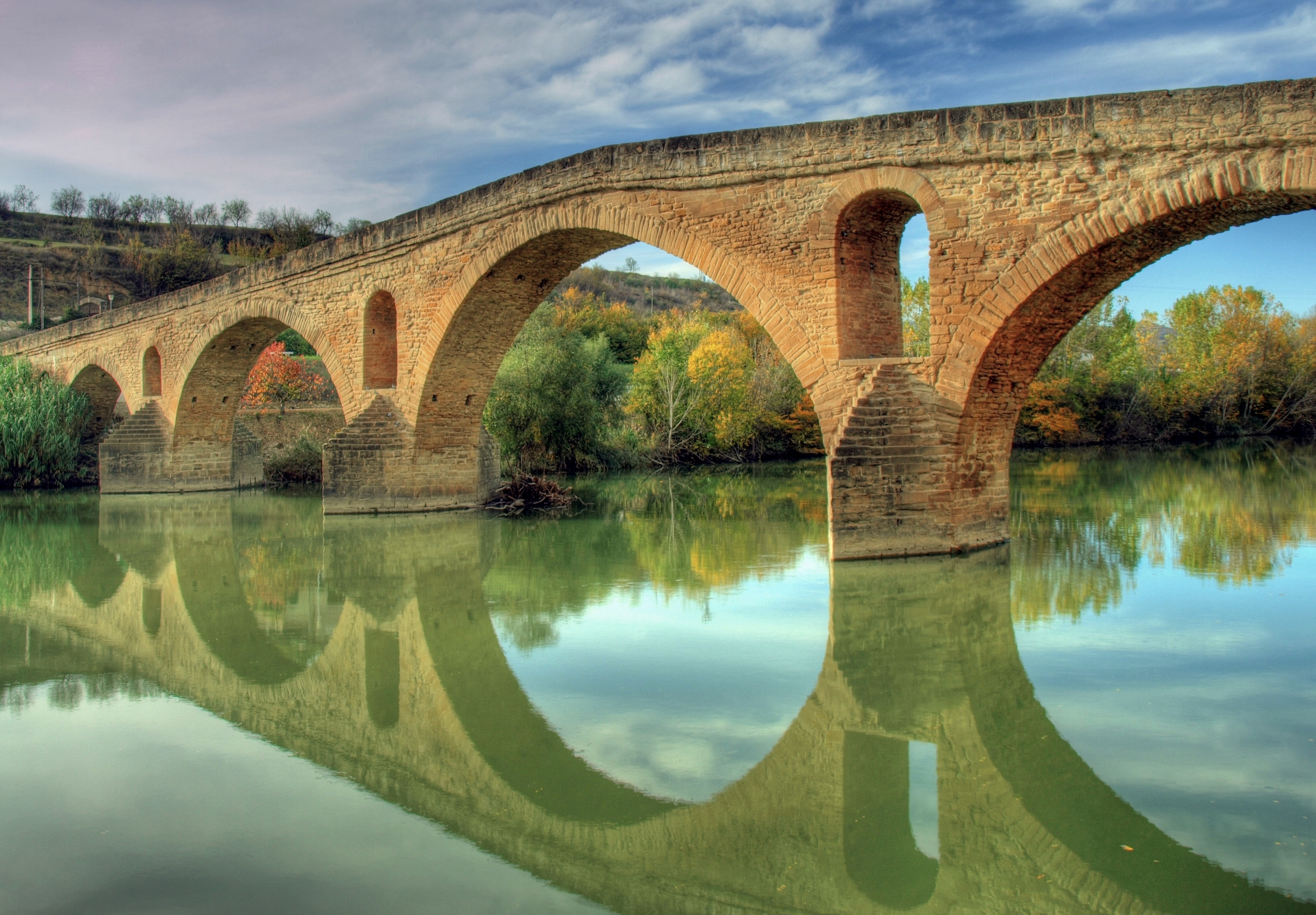 Puente la Reina (Gares, cooficialmente en euskera) es una villa situada en la Comunidad Foral de Navarra (España), en la merindad de Pamplona, a 24 km de la capital de esta comunidad (Pamplona) y en la comarca de Valdizarbe. Esta villa es un punto muy importante en el camino de Santiago. La tradición dice que el nombre de Puente la Reina proviene del puente románico sobre el río Arga, que fue mandado construir en el siglo XI por una anónima reina de Navarra. Generalmente se hace referencia a que esta reina fue Doña Mayor, esposa de Sancho el Mayor o Doña Estefanía, mujer de García el de Nájera.